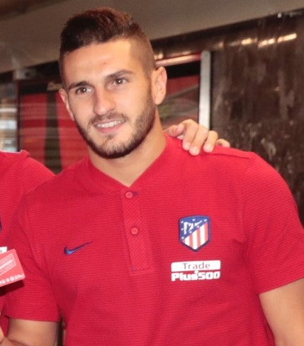 La estación de Estadio Metropolitano está preparada para facilitar el desplazamiento a las miles de personas que asistirán el próximo día 16 al partido inaugural del nuevo feudo rojiblanco. Una estación en la que los seguidores del Atlético de Madrid se encontrarán como en su casa y podrán observar cómo la historia de Metro está ligada a la de los estadios de su equipo, admirar los diferentes escudos que ha lucido el Atlético de Madrid y disfrutar con la iluminación de los colores rojiblancos. ¡Aúpa Atleti!